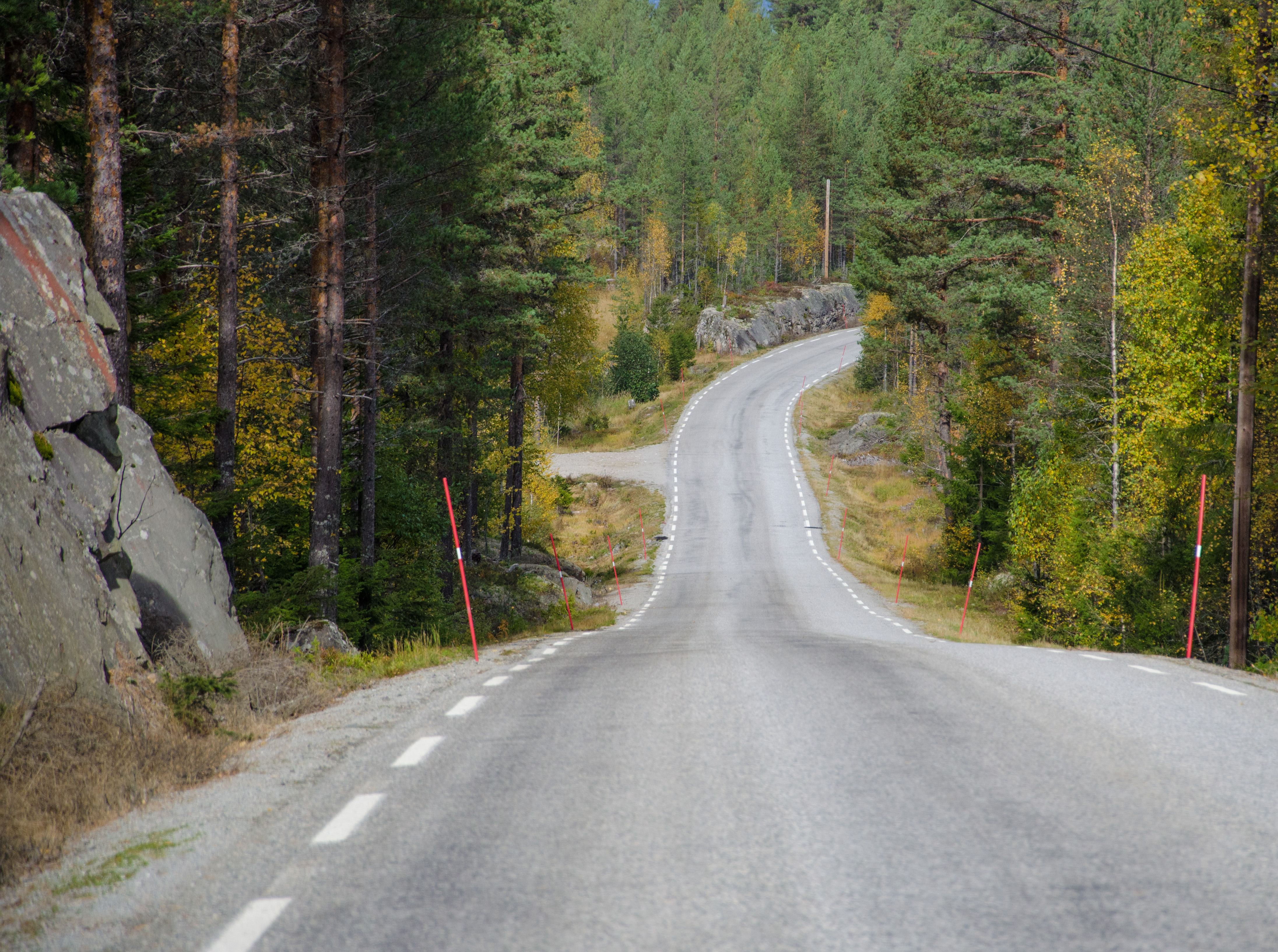 Fylkesvei 602 Follsjøvegen